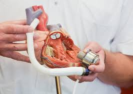 Kunstherz HeartMate 3 in Hand